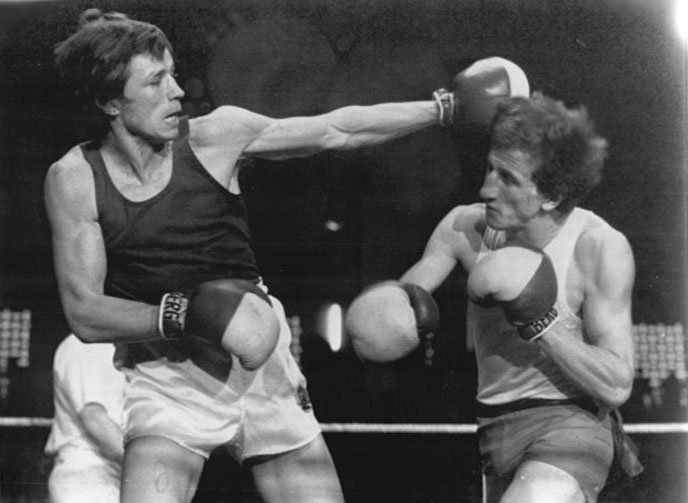 Richard Nowakowski, Zagorski ADN-ZB CAF-Tele,22.11.81-BL-VR Polen: Internationales Felix-Stamm-Turnier in Warschau - Einen ersten Rang und zwei zweite Plätze belegten die DDR-Boxer beim 4. internationalen Felix-Stamm-Turnier, das vor 4500 Zuschauern in Warschau zu Ende ging. Richard Nowakowski (l.) aus der DDR, Europameister im Federgewicht, überzeugte auch im Finale gegen Polens Leichtgewichtler Zagorski und wurde Abbruchssieger. Abgebildete Personen Nowakowski, Richard: Boxer, Deutschland (DDR) Nowakowski, Richard (English)